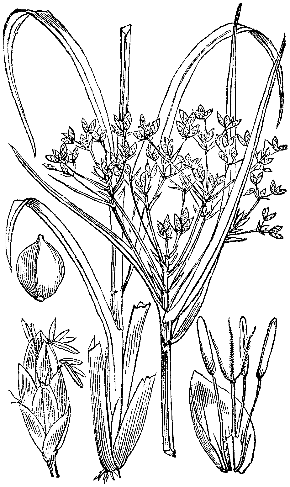 Slika 479. Gozdna srpica. (Scírpus silváticus.) [sic!]